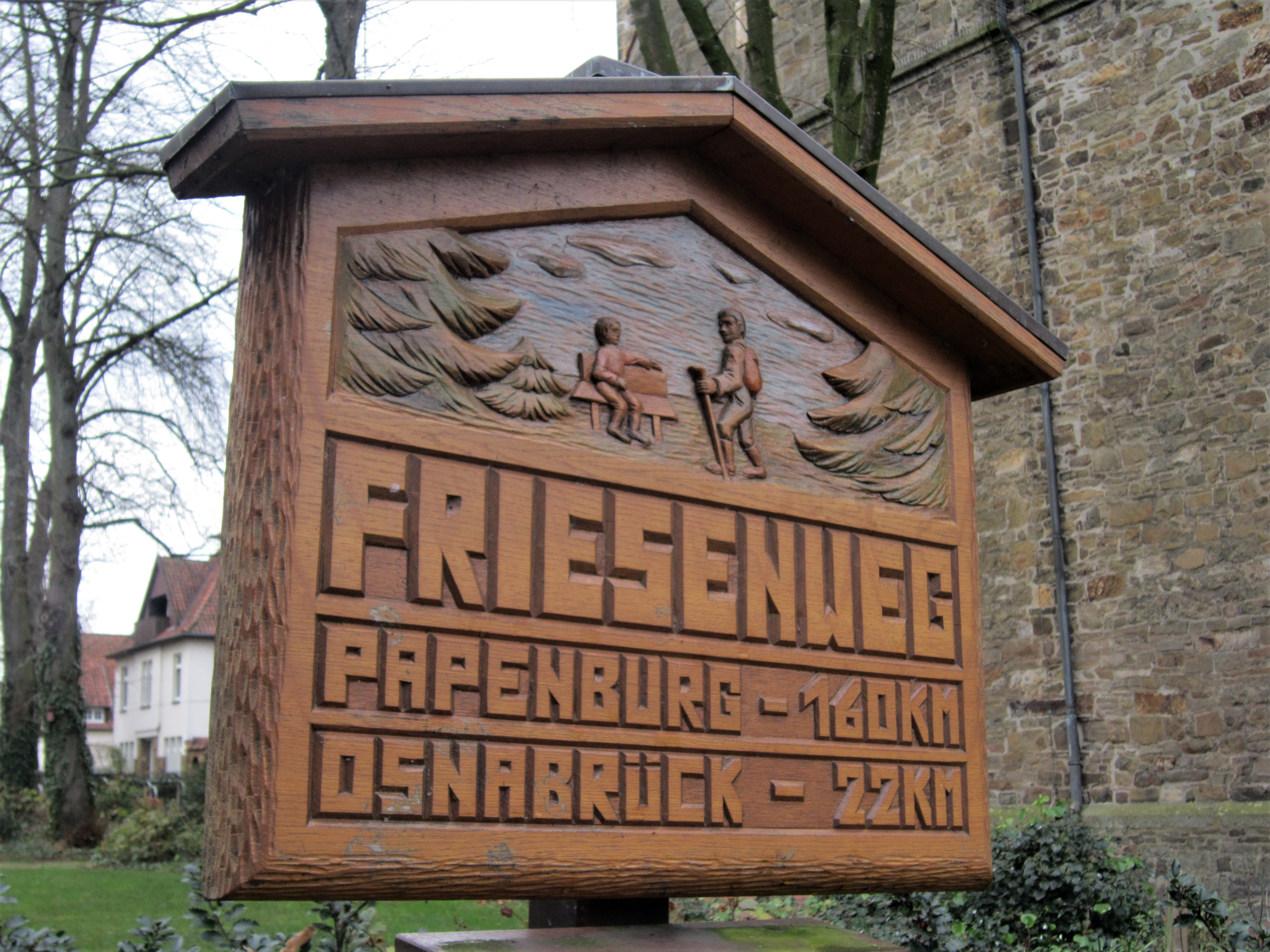 Historisches Hinweisschild auf den ehemaligen Friesenweg (Vorläufer des heutigen Wanderwegs Hünenwegs von Osnabrück nach Meppen) bei der Martinskirche in Bramsche (Landkreis Osnabrück / Niedersachsen)